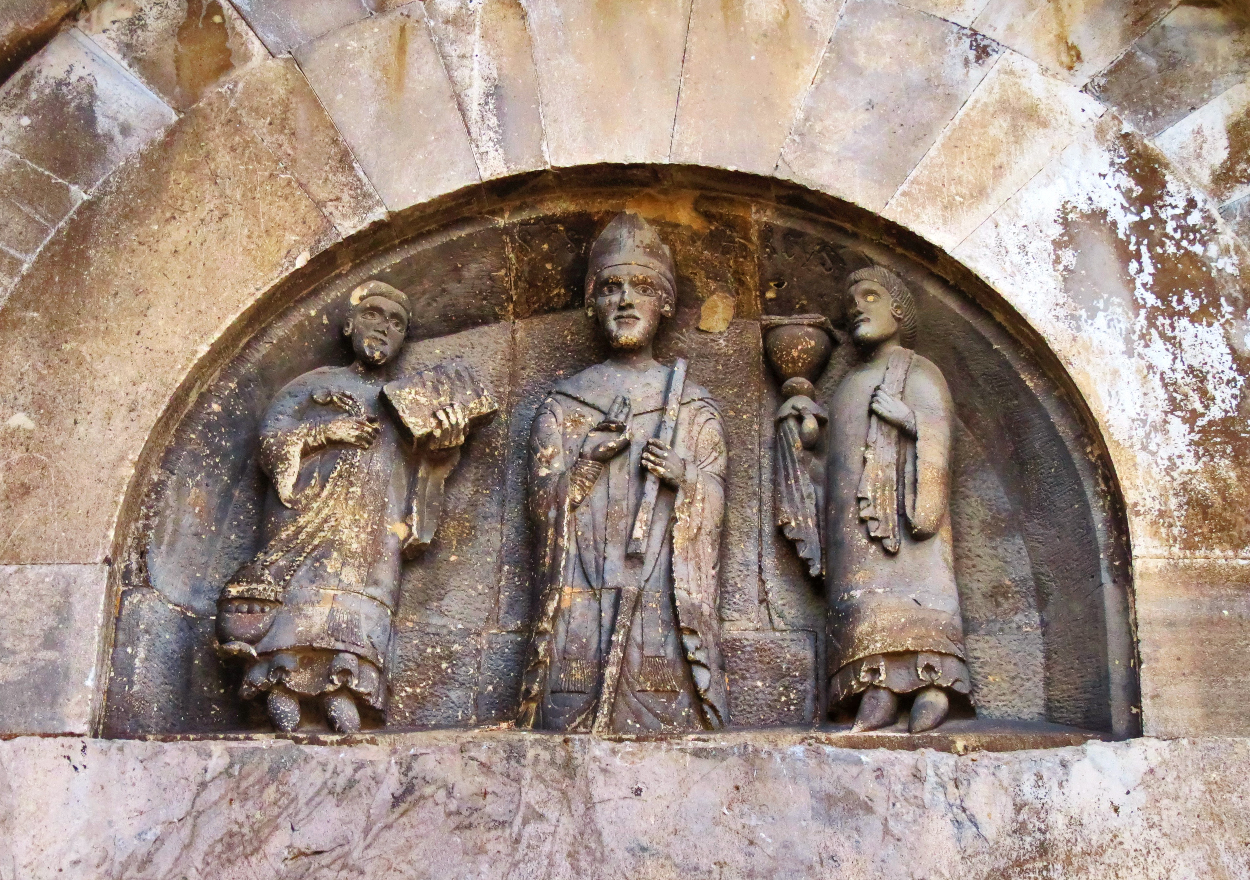 San Marco fra due diaconi, scolpiti nella lunetta sopra l'ingresso al cappellone dedicato al santo a Bovino (FG)